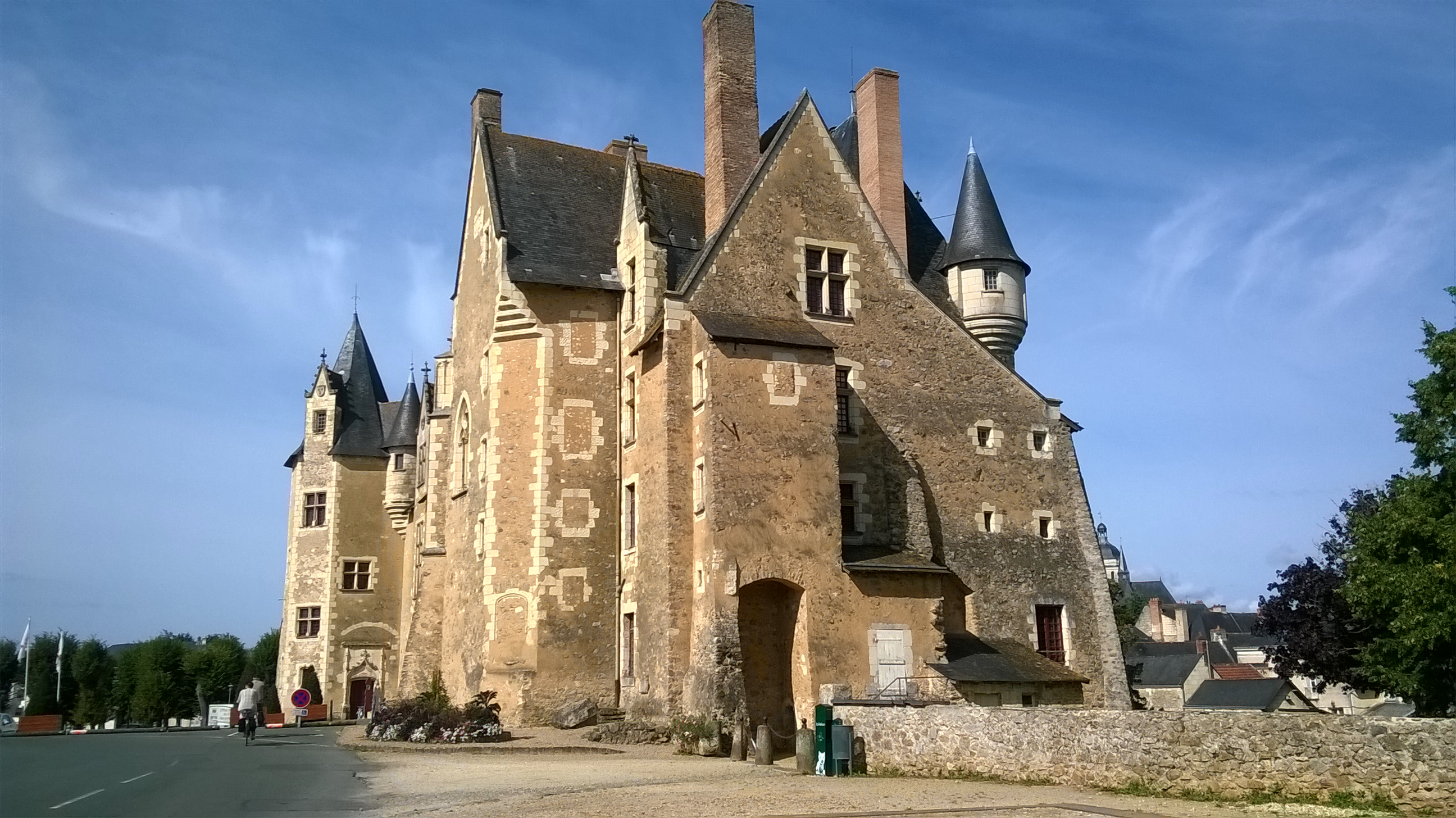 Château et Apothicairerie de Baugé.